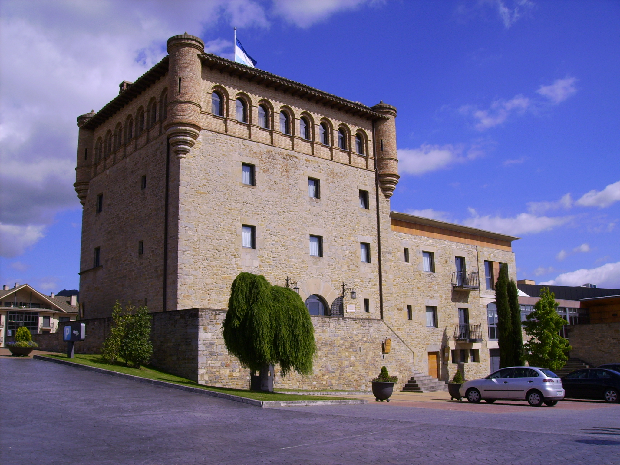 Castillo de Gorráiz